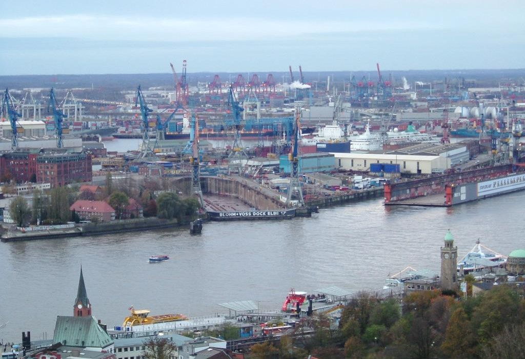 BLOHM+VOSS Dock Elbe 17